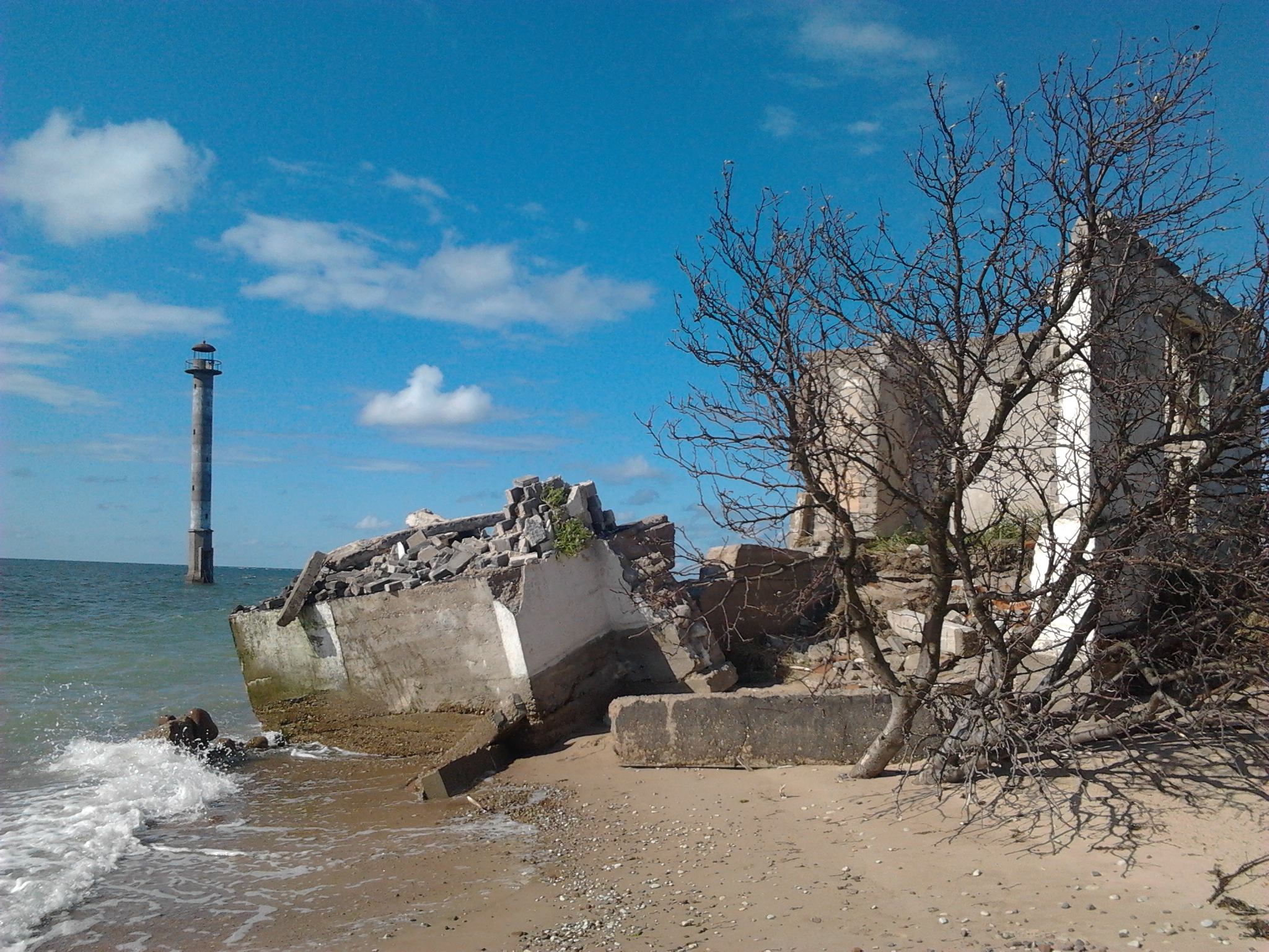 Endise nõukogude piirivalveposti jäänused, Harilaid